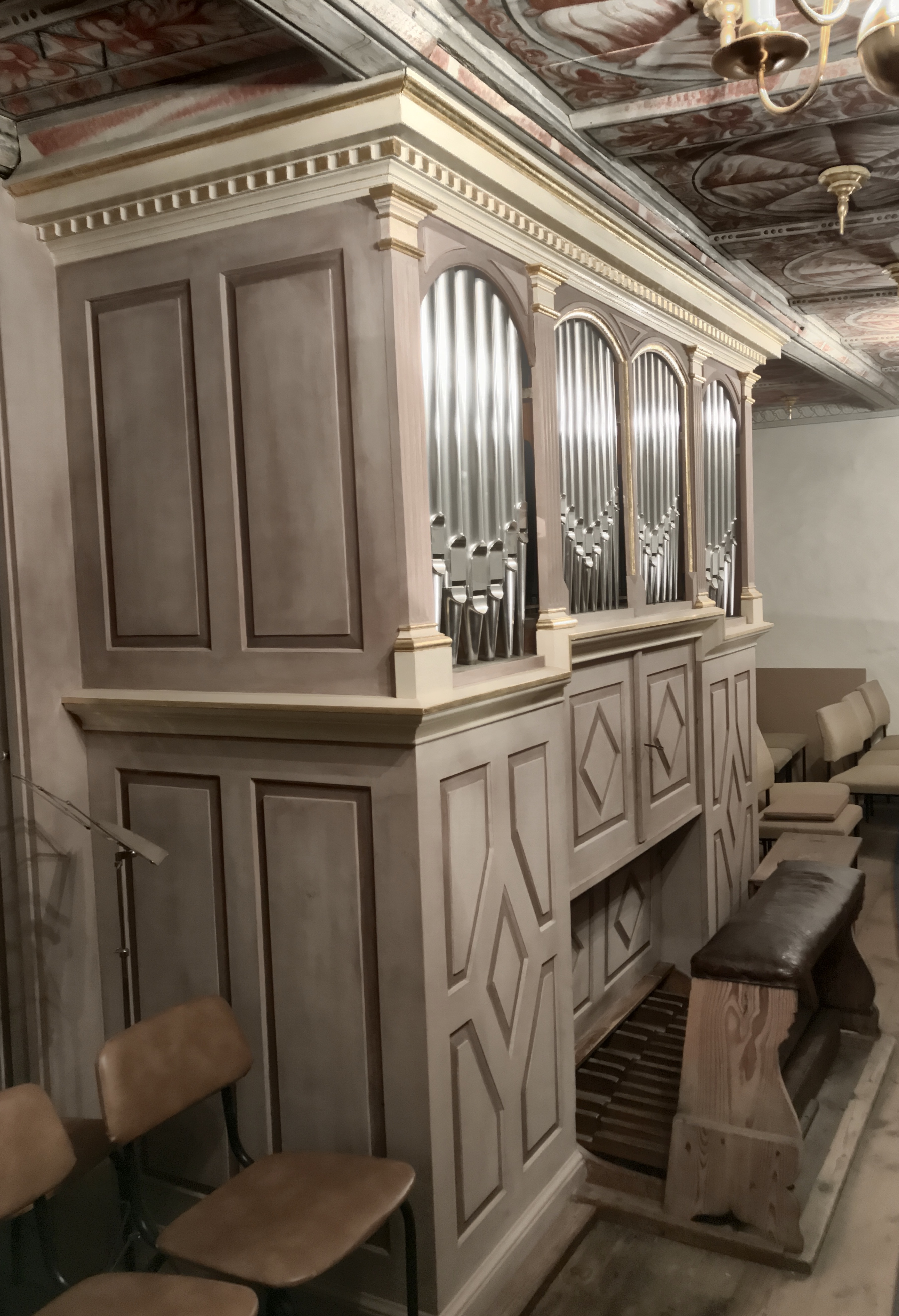 Orgel Dorfkirche Blochwitz